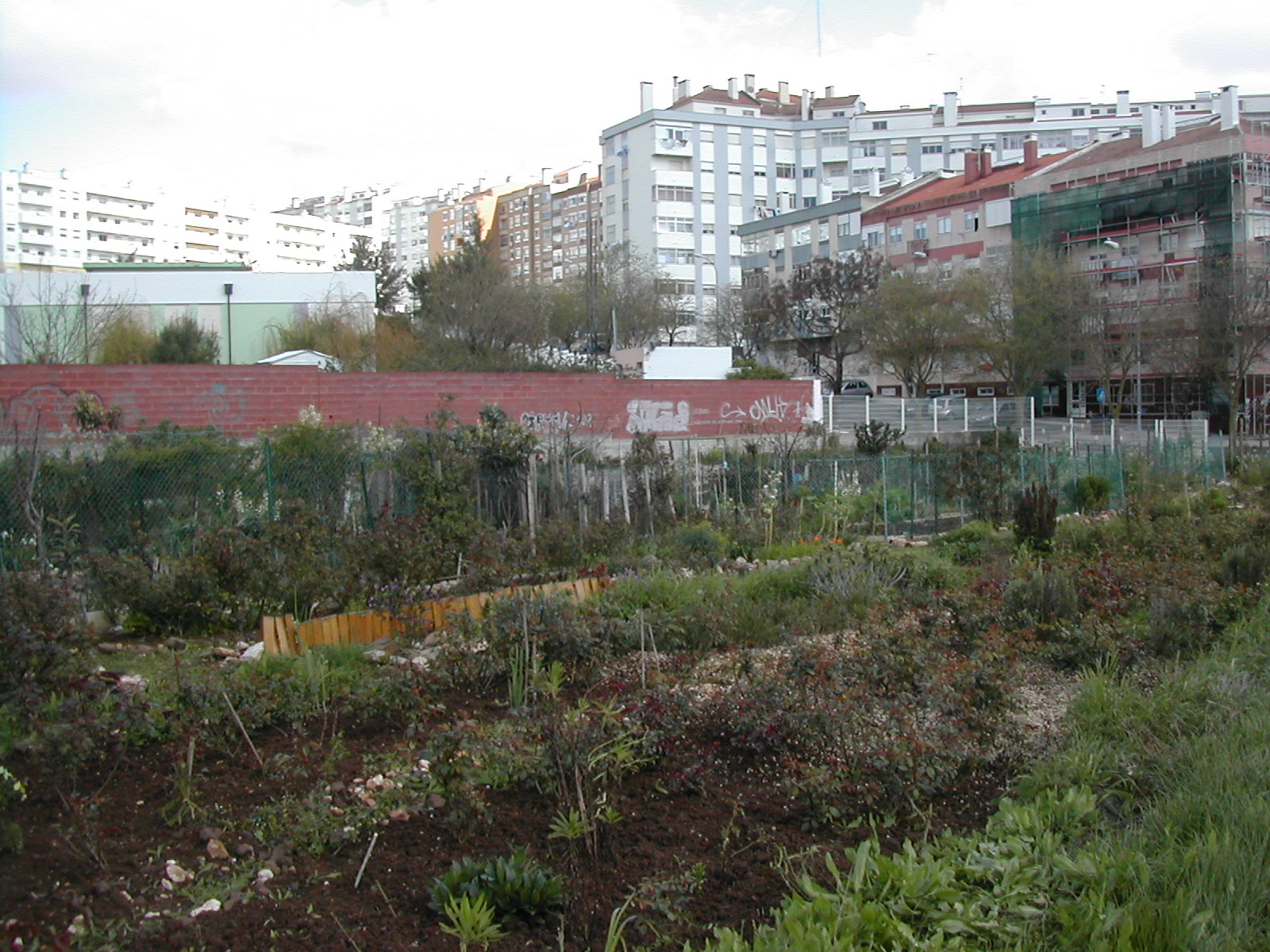 Horta urbana no Casal de São Brás, Amadora, Portugal